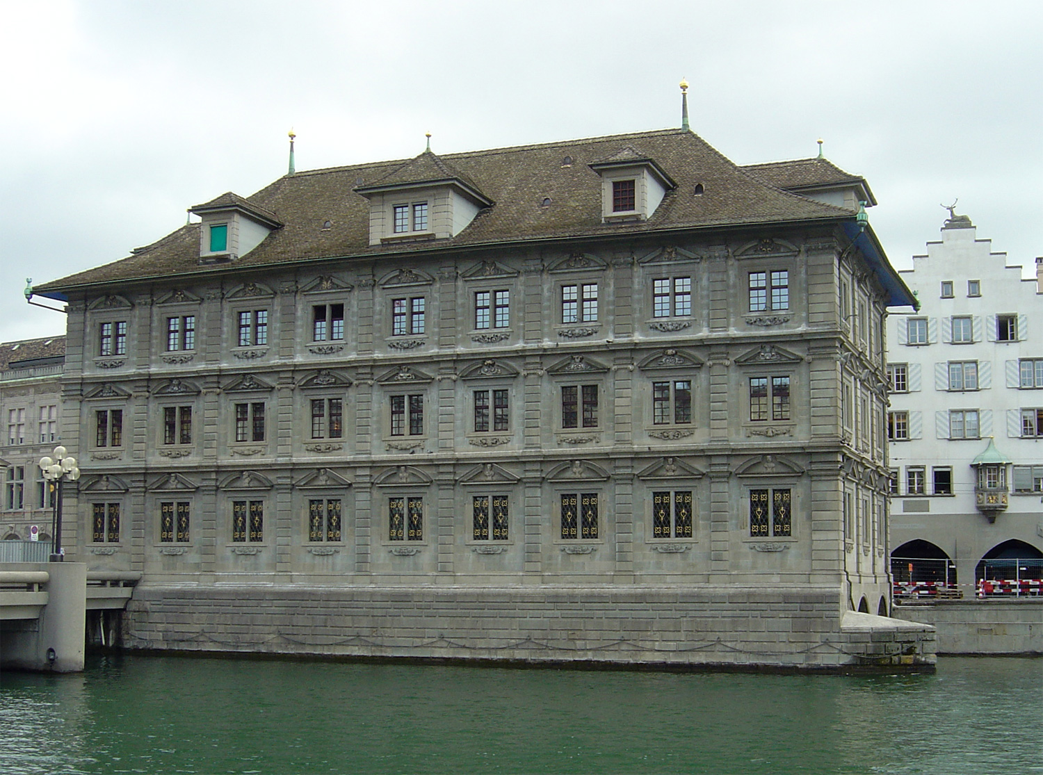 Das Zürcher Rathaus (Westseite)